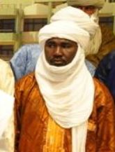 Mahamadou Djeri Maïga à Ouagadougou, le 16 novembre 2012.